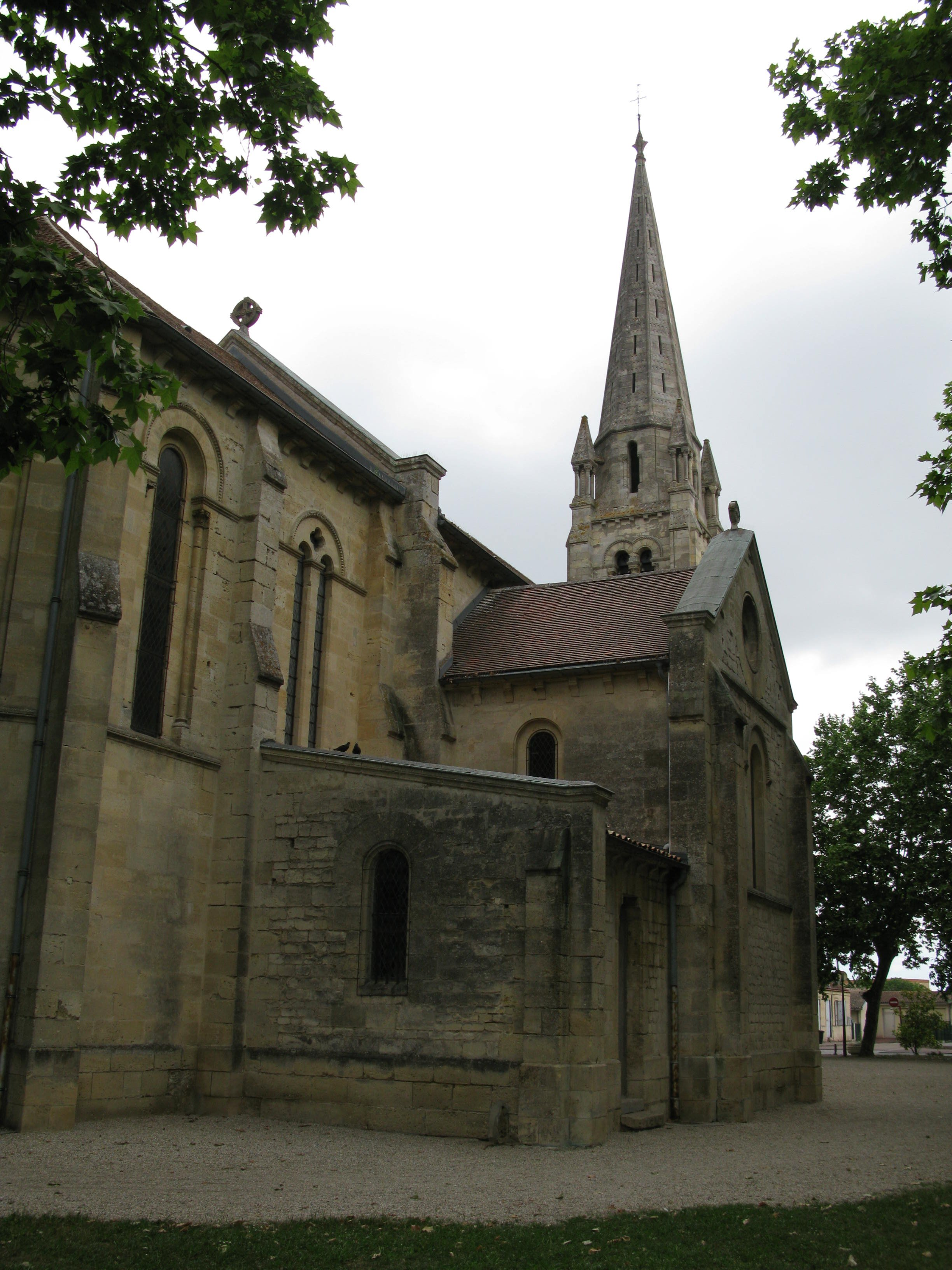 Parempuyre - l'église, vue arrière